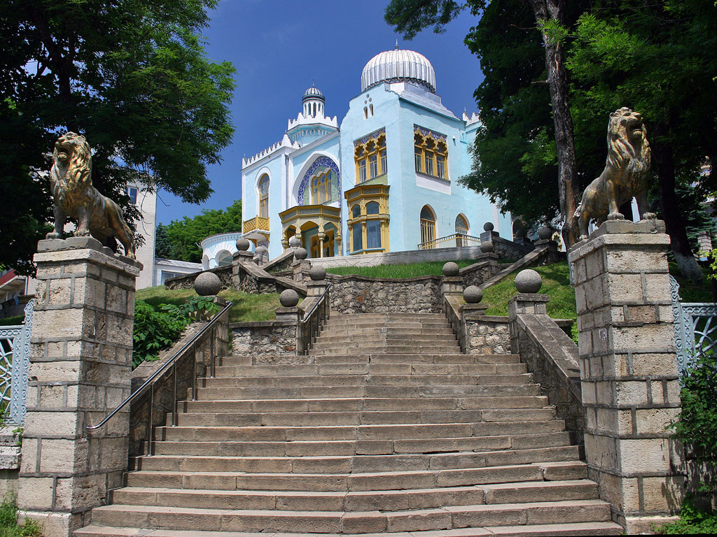 Дворец эмира Бухарского